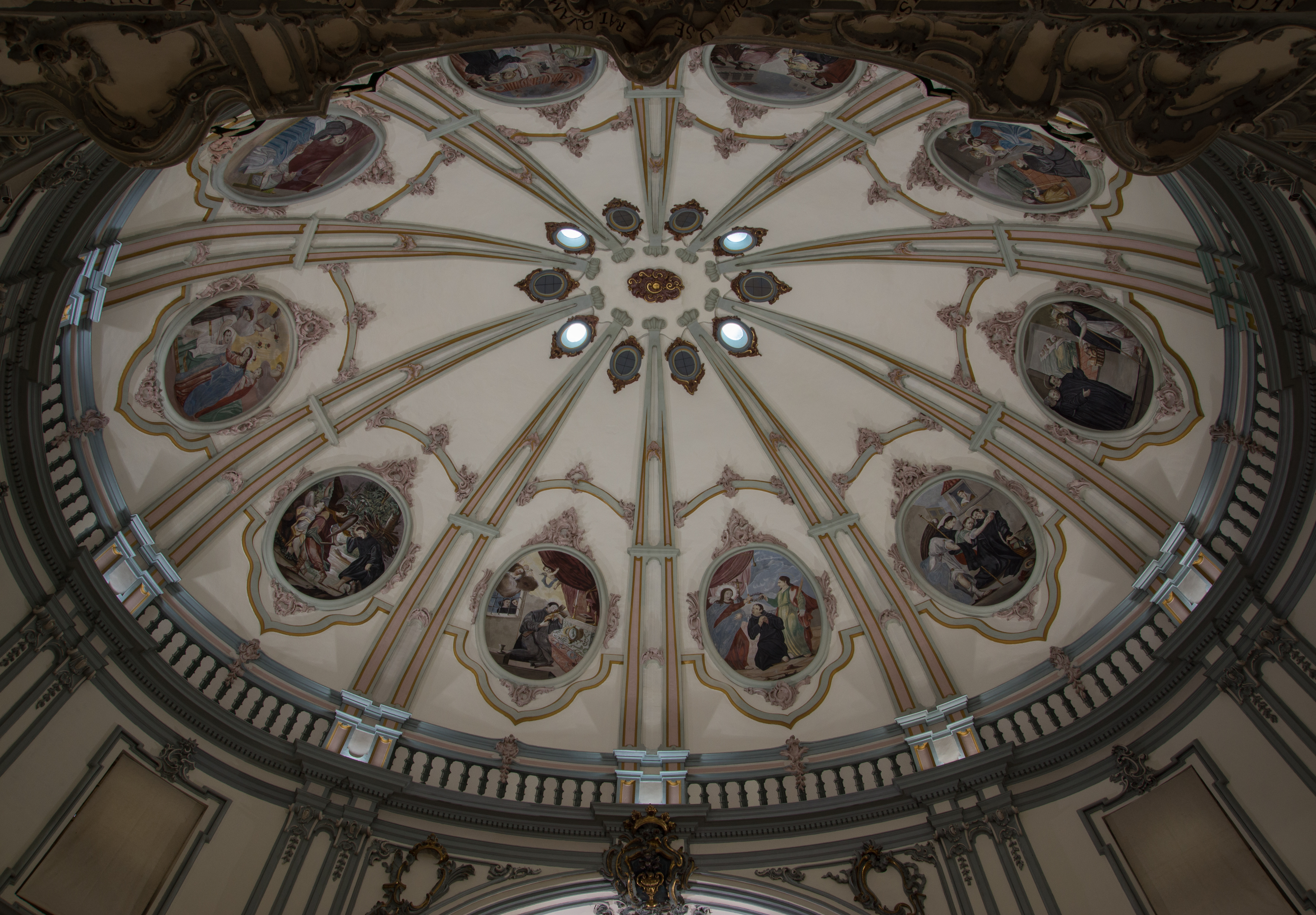 Cupula de San Juan de Dios